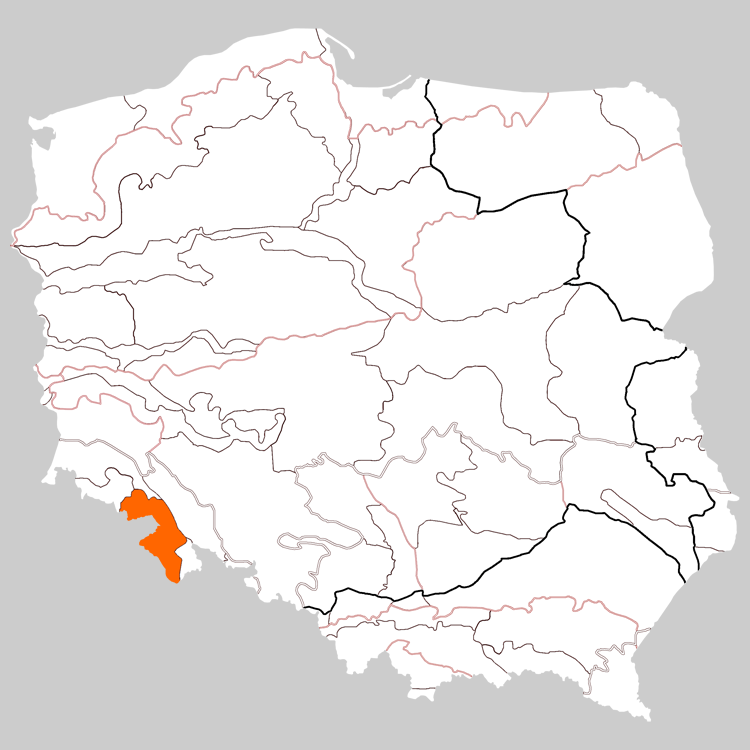 Physico-geographical regionalization of Poland Macroregion 332.4-5 Central Sudetes Regionalizacja fizycznogeograficzna Polski Makroregion 332.4-5 Sudety Środkowe